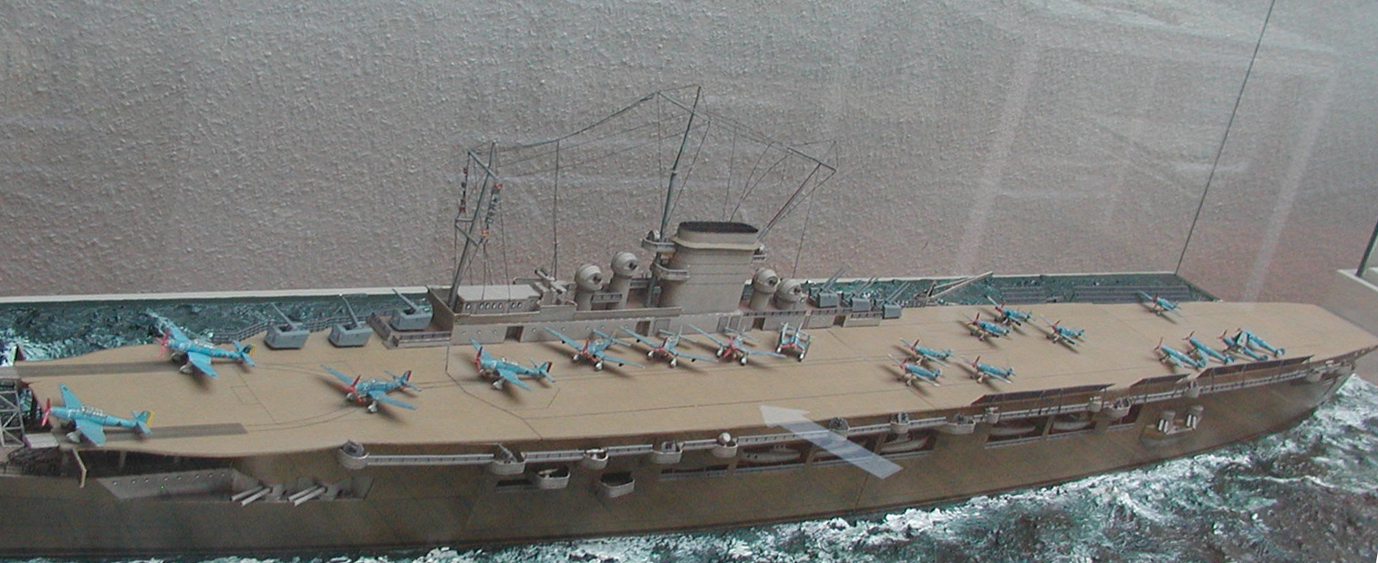 Ein Modell des Flugzeugträgers Graf Zeppel in Aeronauticum Cuxhaven